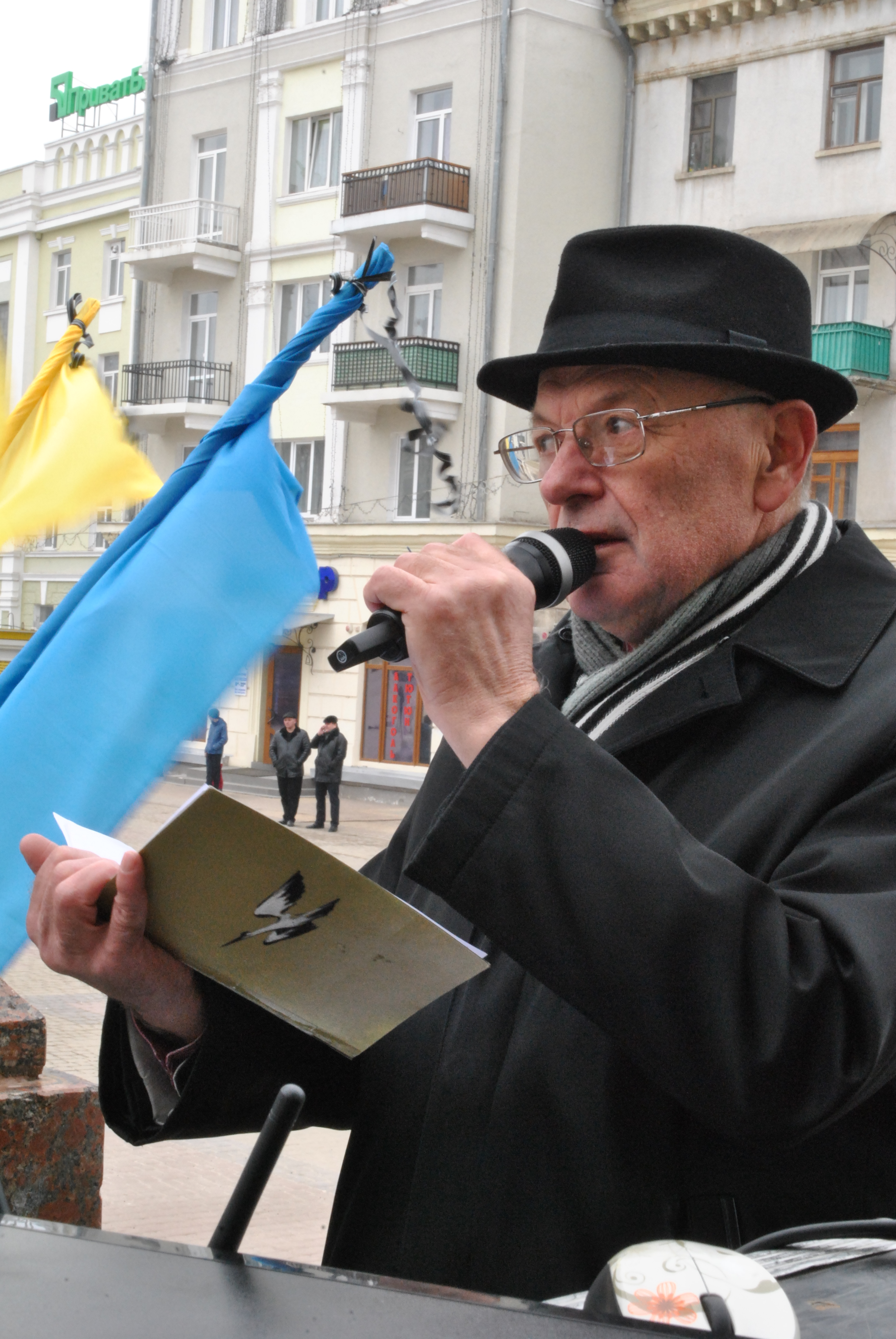 Український науковець, письменник, громадський діяч Олег Герман під час віче пам’яті за Героями Небесної сотні на Театральному майданя Тернополя.